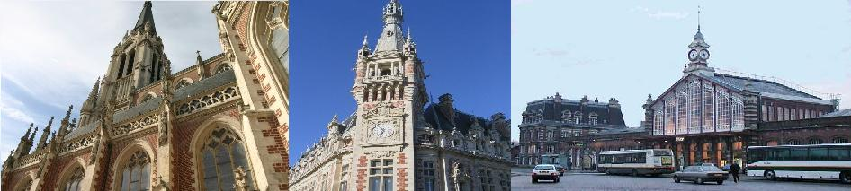 Panorama de divers bâtiments de Tourcoing